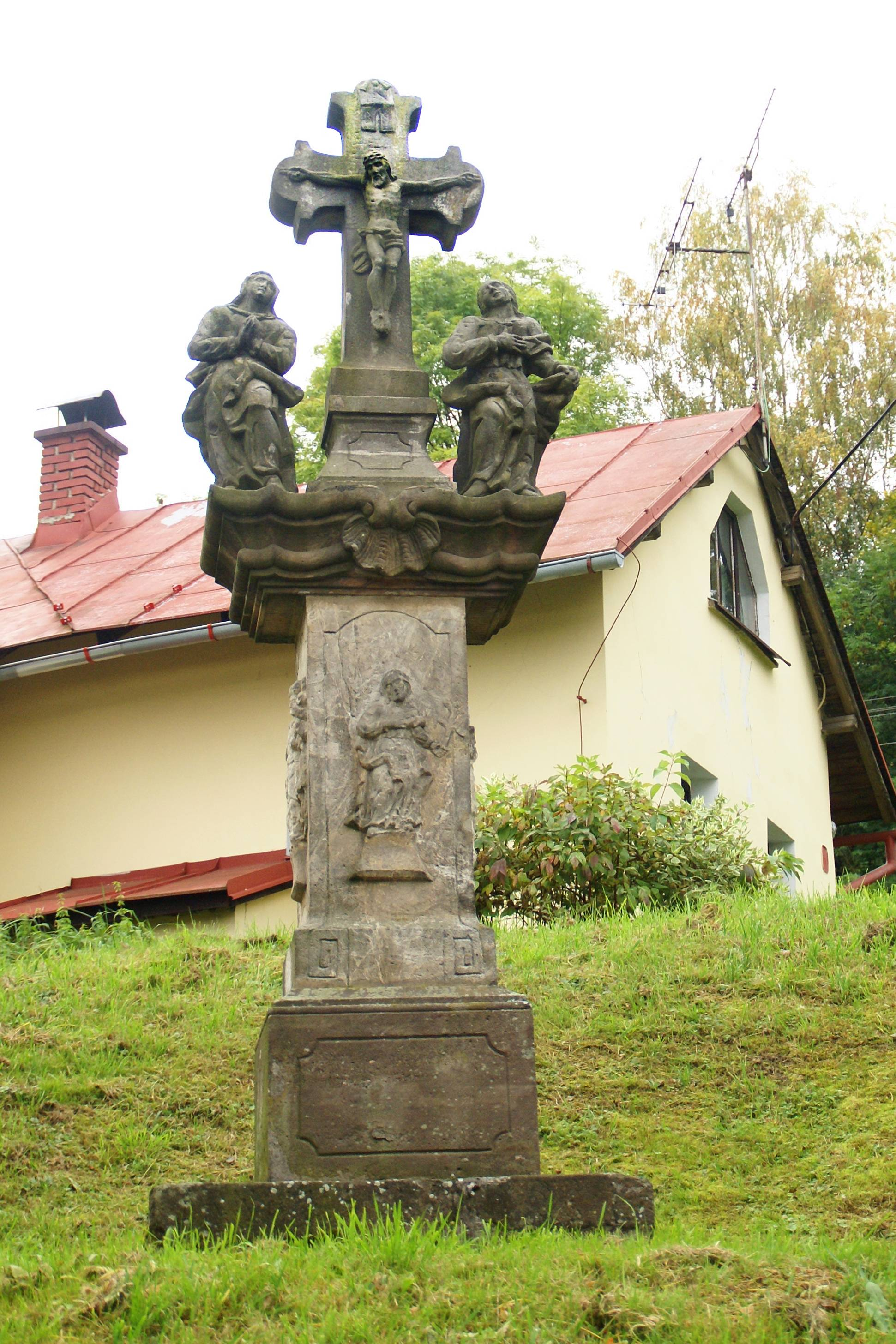 Sousoší Kalvárie (Příkrý), při zvonici, Příkrý